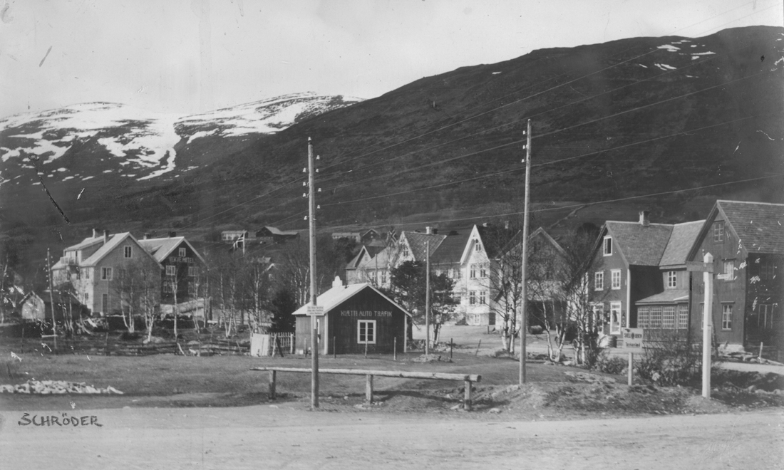 Oppdal sentrum, mest sannsynlig før andre verdenskrig.